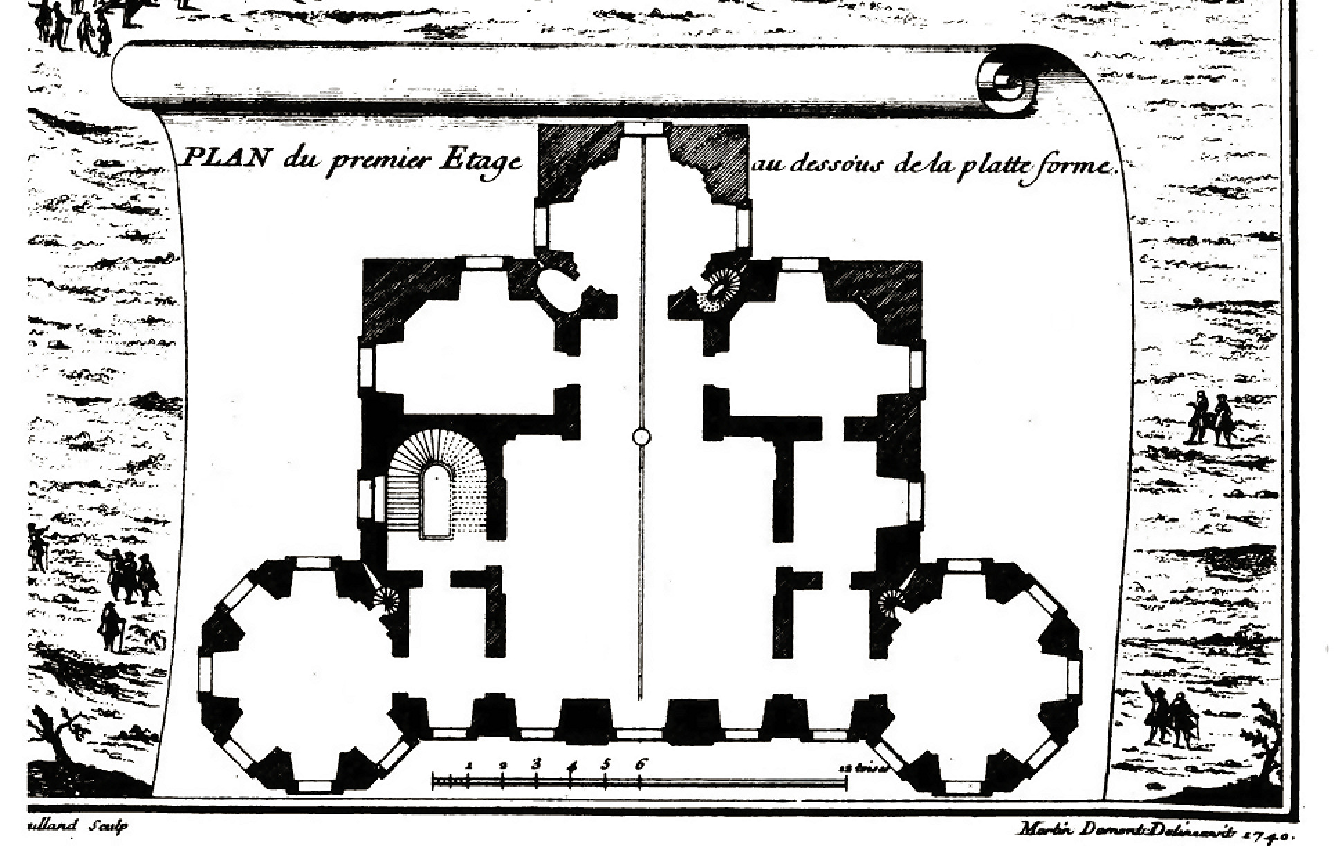 Premier étage de l'Observatoire de Paris.